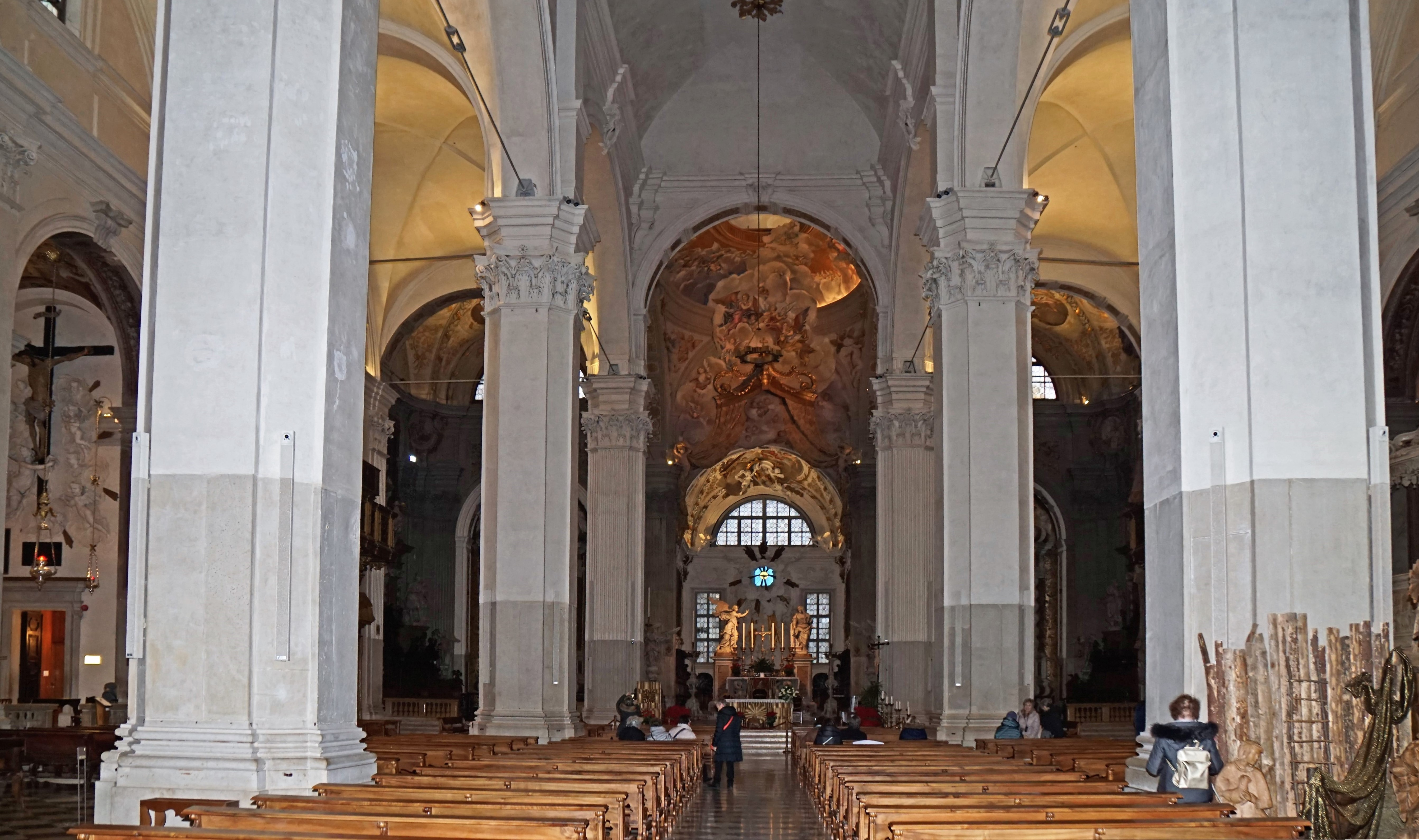 Innenansicht des Domes Santa Maria Annunziata (Udine)